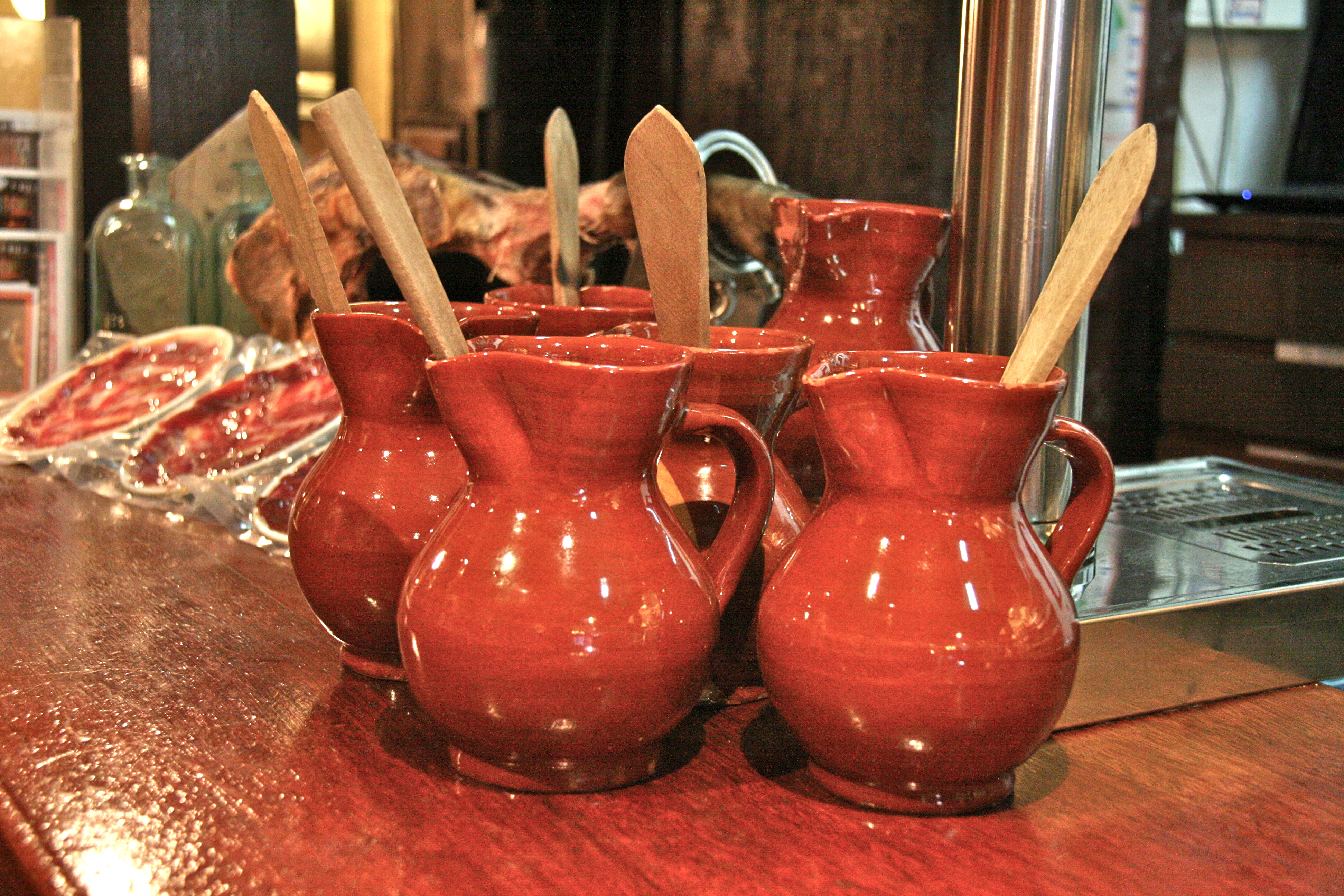 Sangria